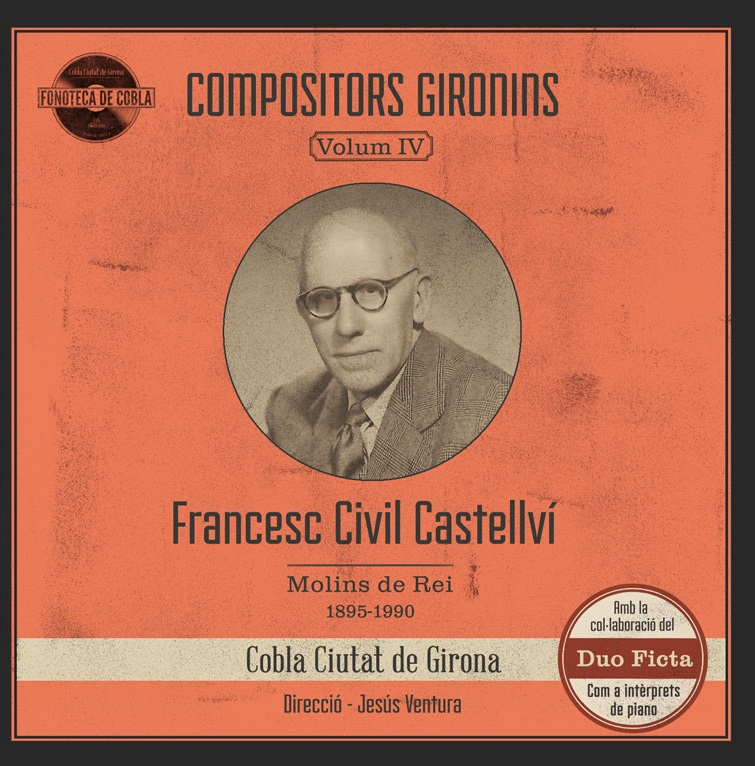 Portada del CD publicat per la Cobla Ciutat de Girona dins la col·lecció Fonoteca de la Cobla i dedicat a les sardanes de Francesc Civil. Amb la col·laboració de Miquel Villalba i el Duo Ficta.